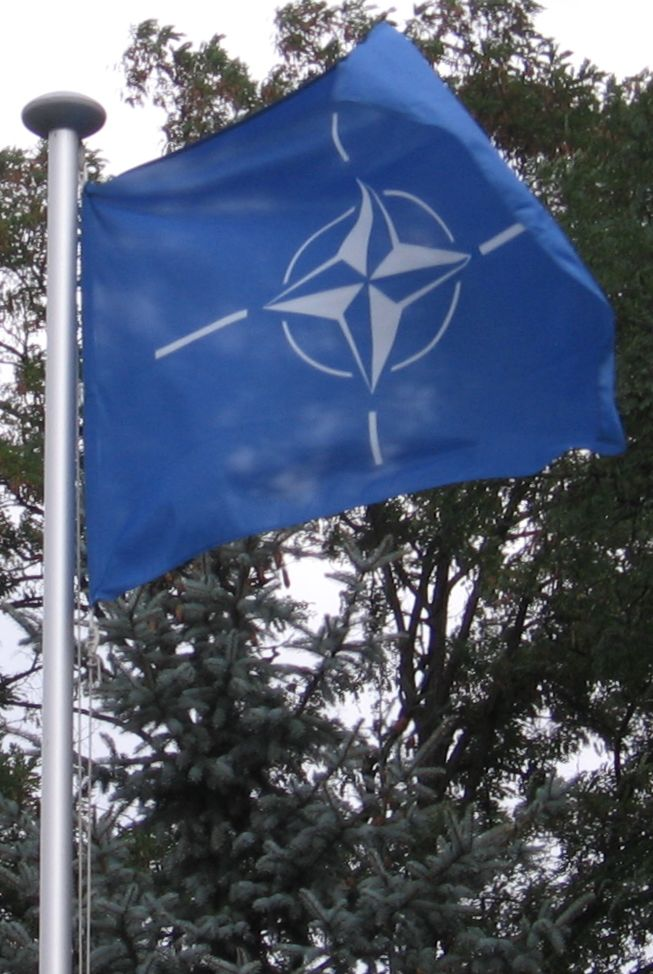 NATO flag